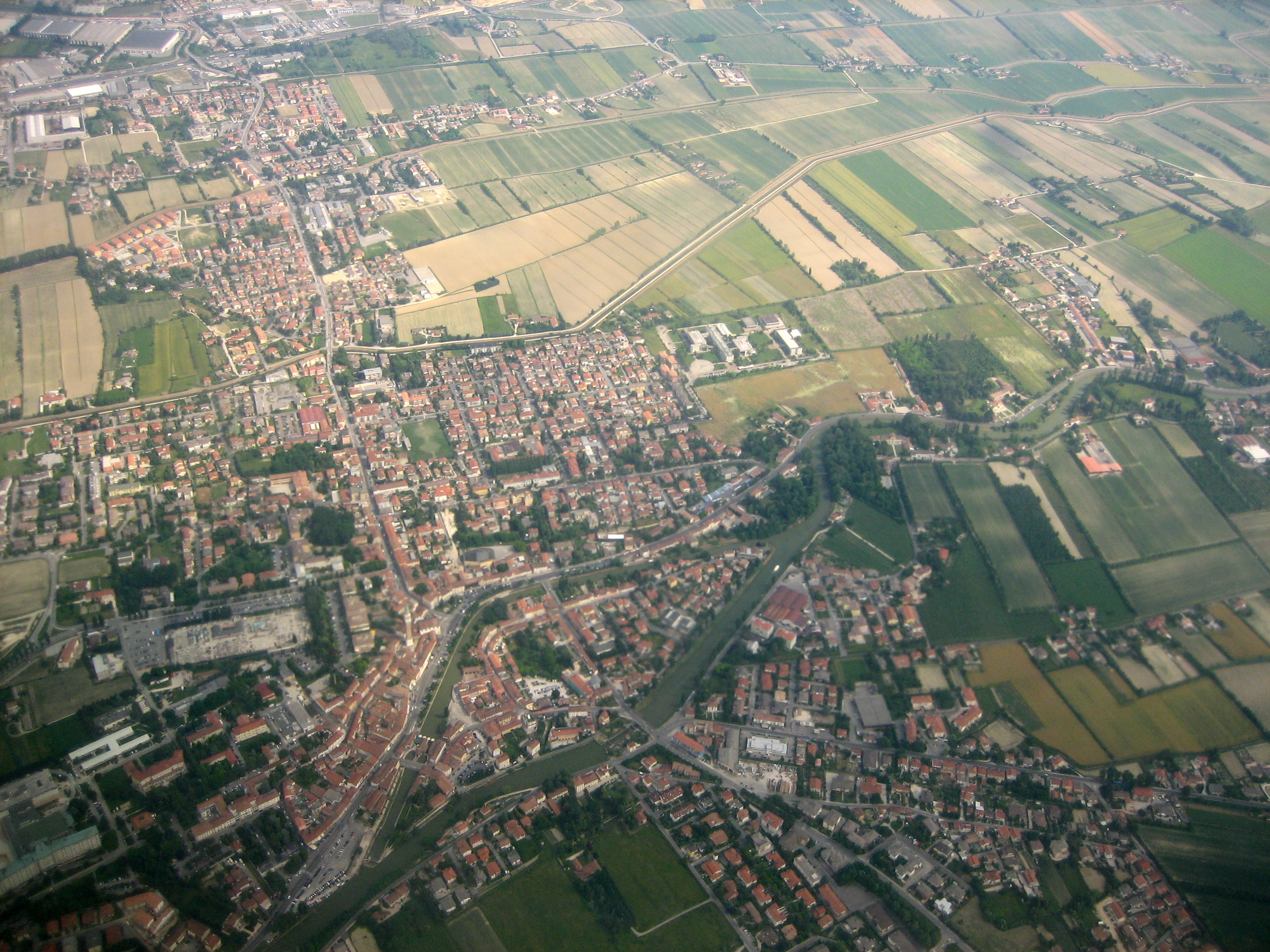 Dolo vista dall'alto.